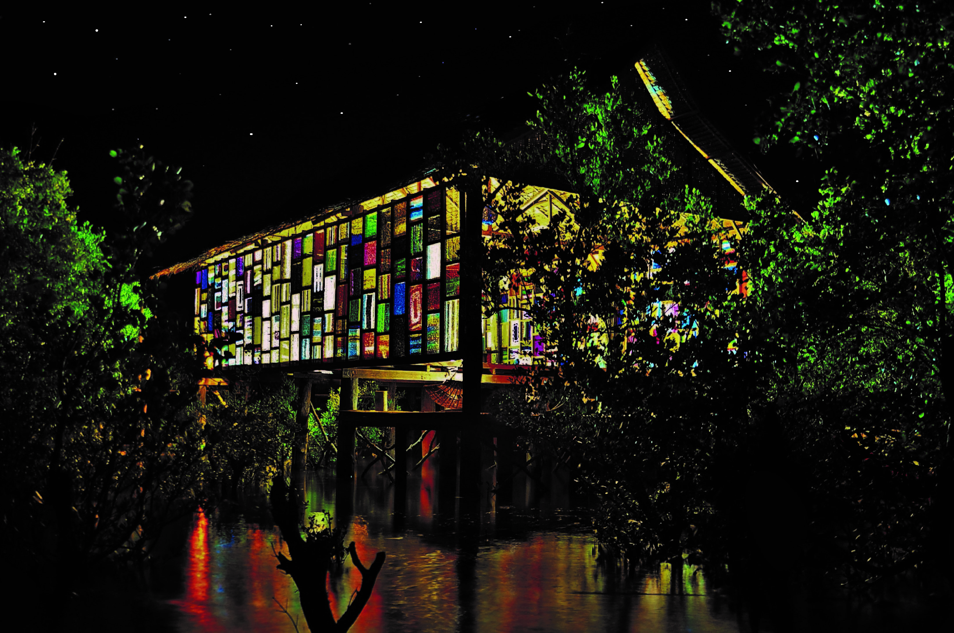 Centre pluridisciplinaire du nouveau village Badjau par Christophe Cormy Donat